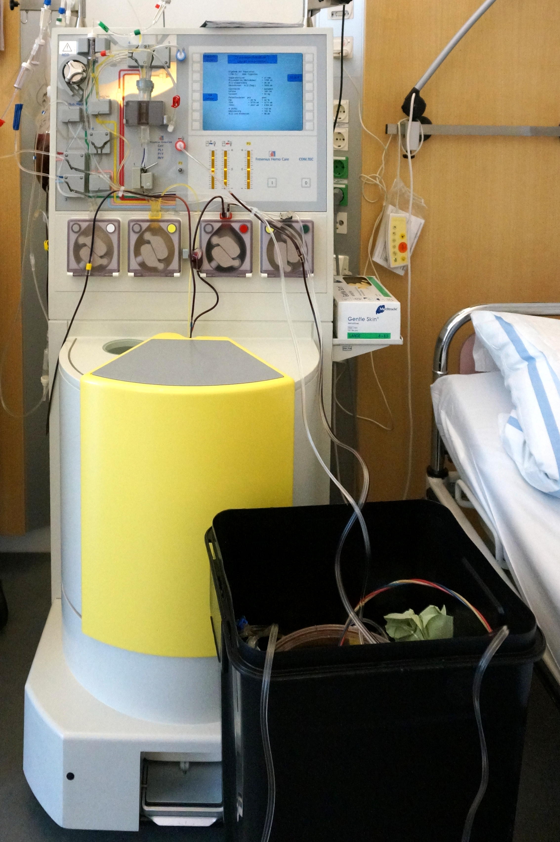 Gerät zur Zell-Apherese (umgangsspr. "Blutwäsche") der Firma Fresenius mit der Bezeichnung Hemo Care